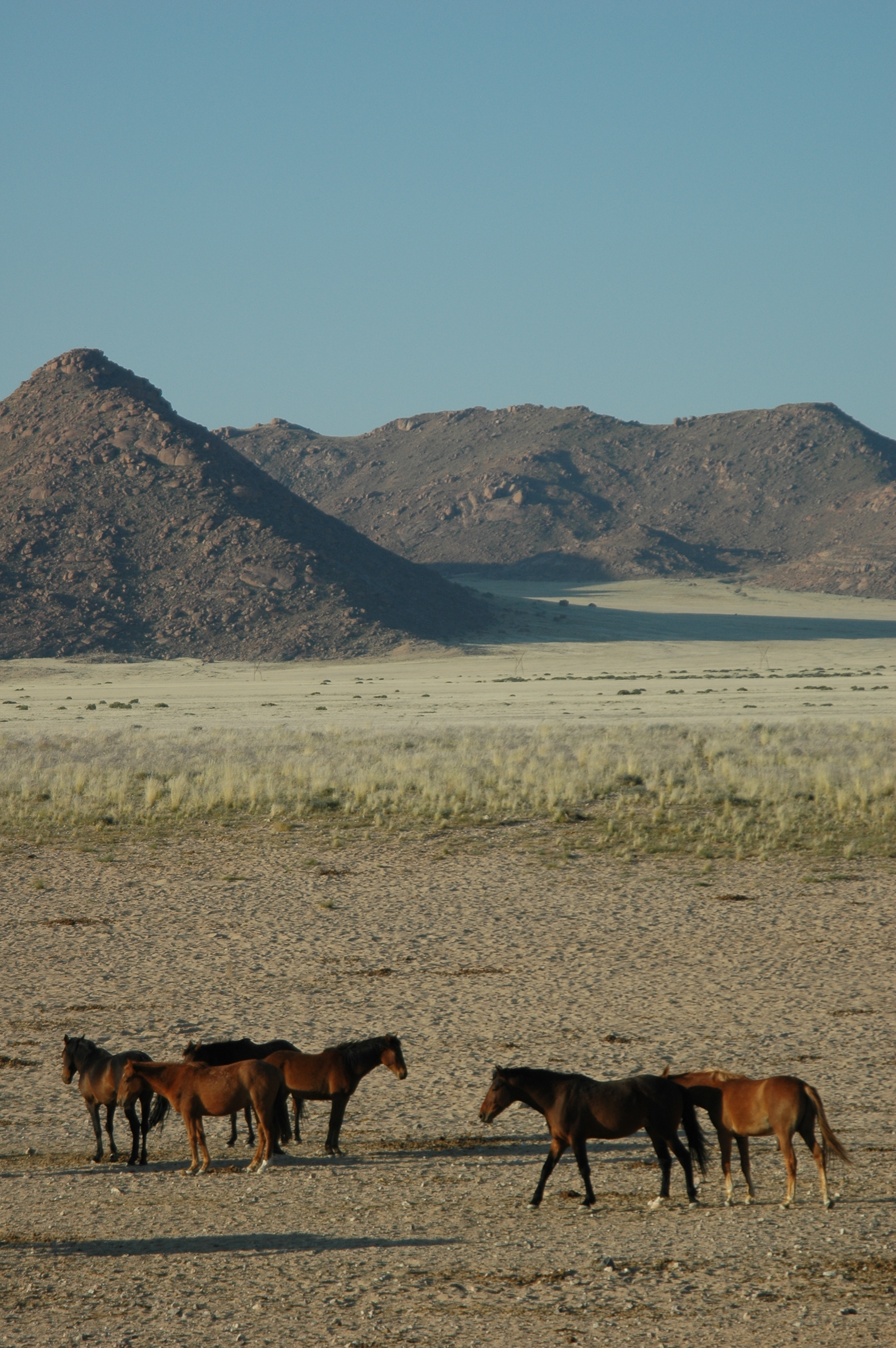 Namibie Photographie prise par GIRAUD Patrick